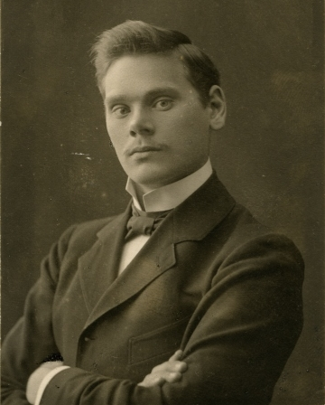 Aleksander Tassa, eesti kunstnik ja kirjanik